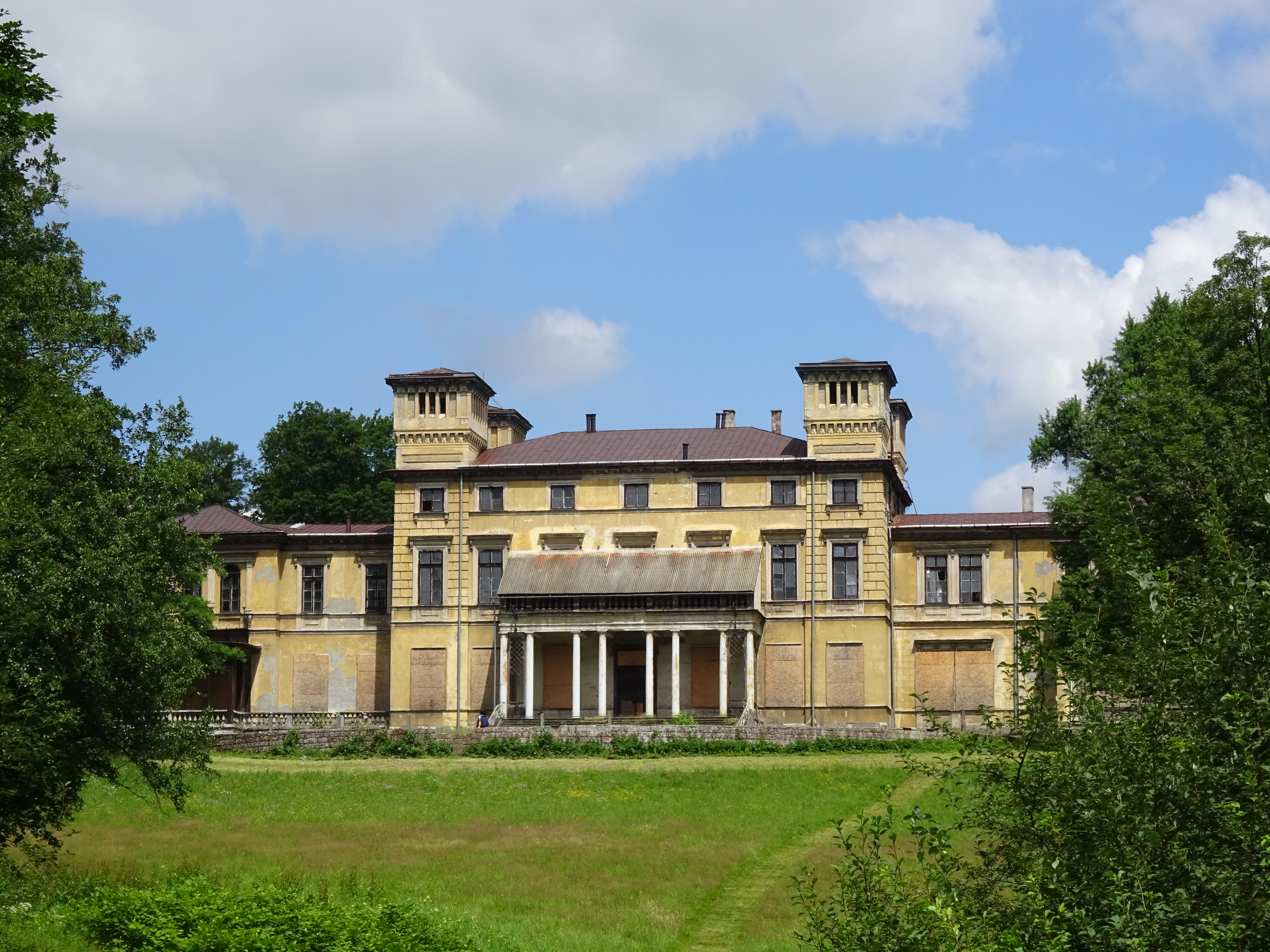 Pałac Potockich w Krzeszowicach. Fasada - widok od strony Parku miejskiego.